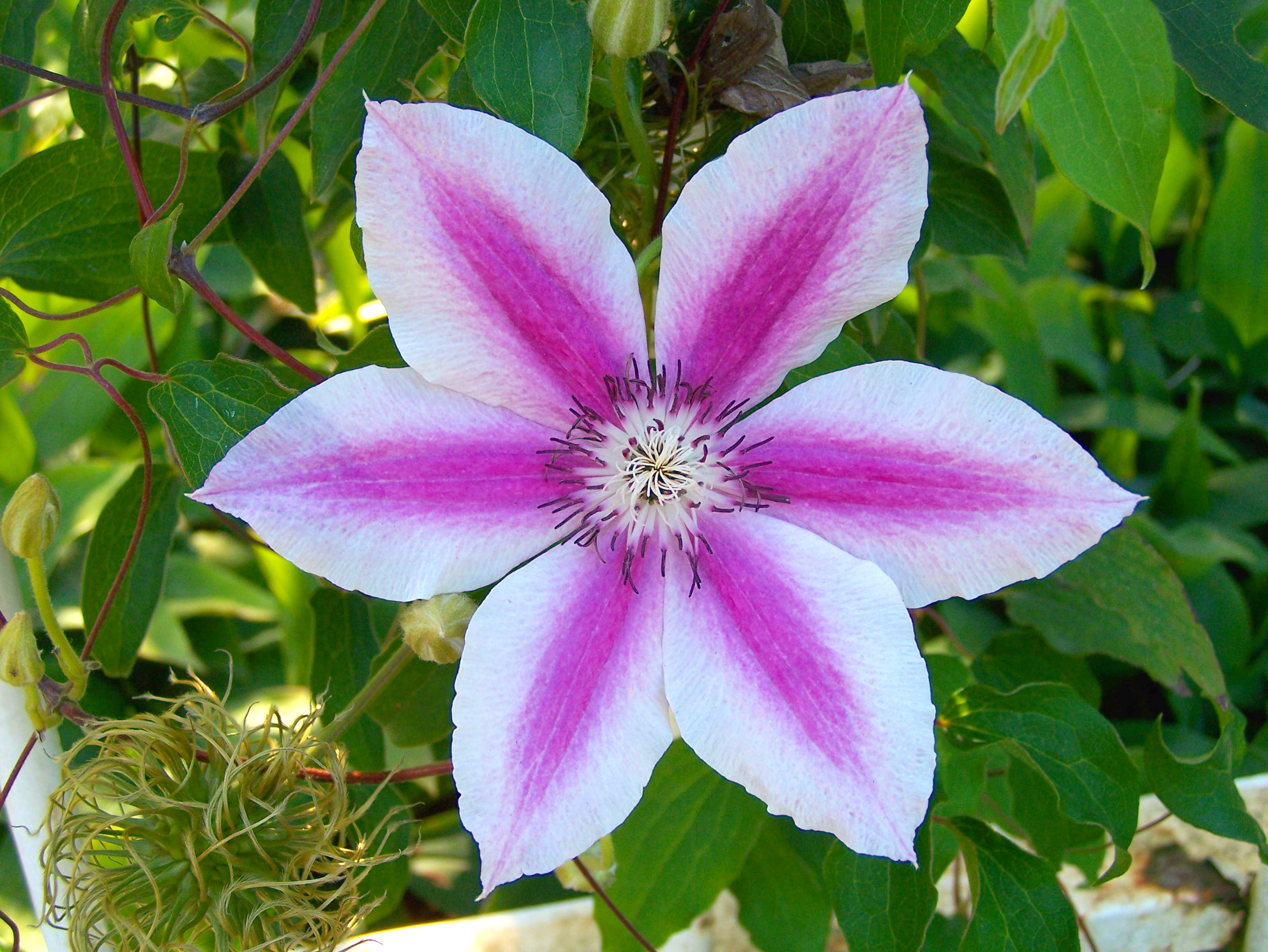 Clematis 'Souvenir du Capitaine Thuilleaux'